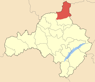 Locator map of Vermiou municipality (Δήμος Βερμίου) at Kozani perfecture, Greece.